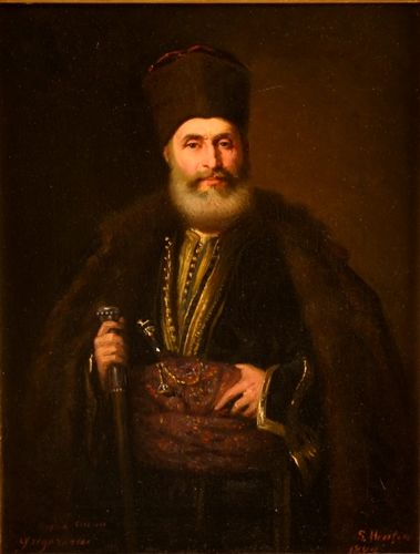 Portretul banului Nasturel Herescu